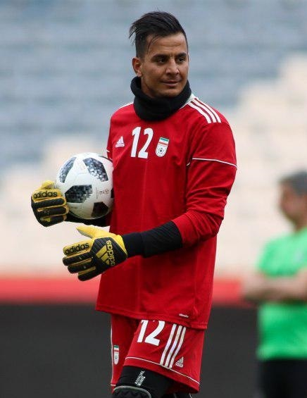 حامد لک در تمرین تیم ملی فوتبال ایران